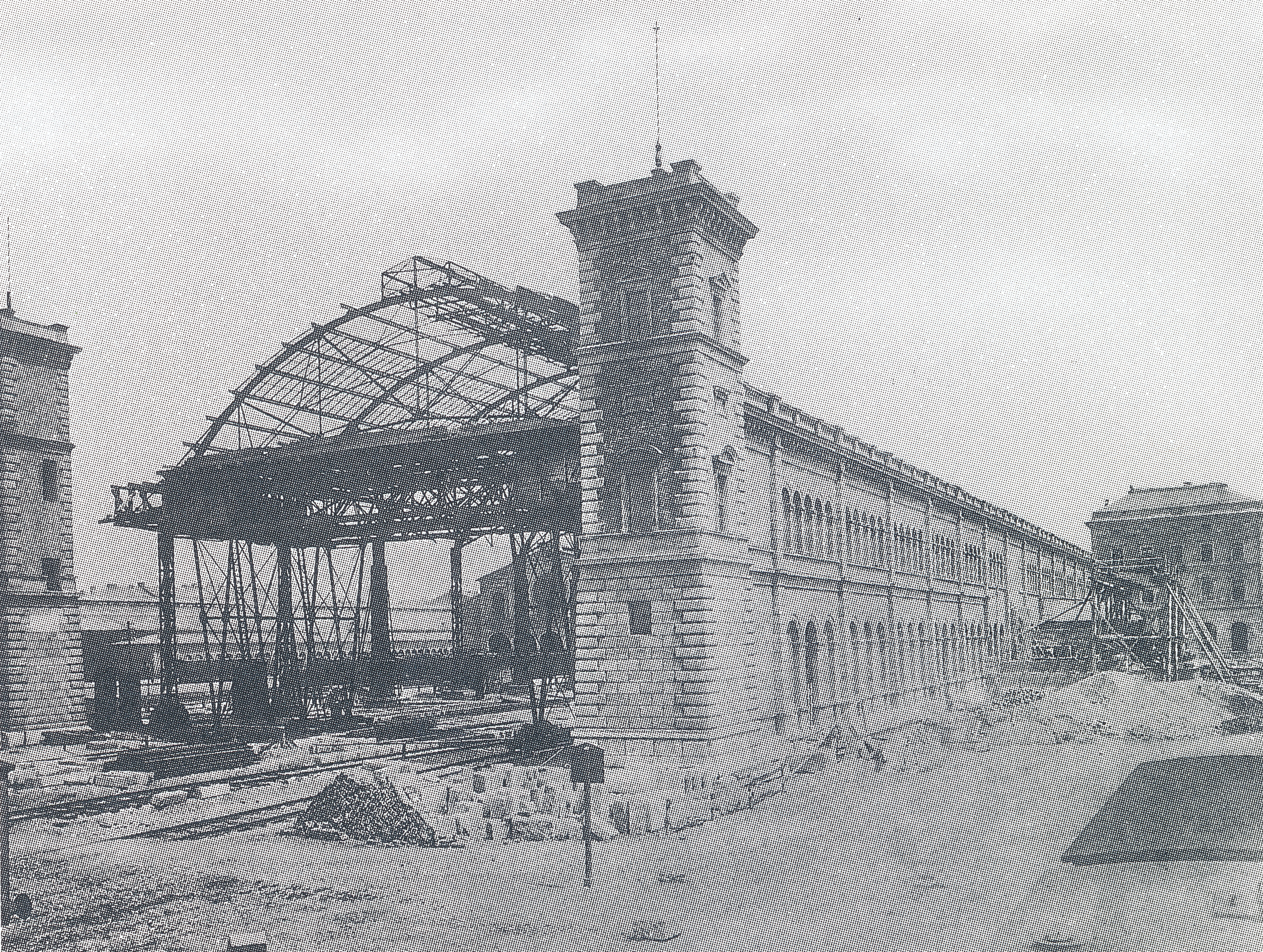 Bau des neuen Centralbahnhofs von Brücklein um 1877/1878.